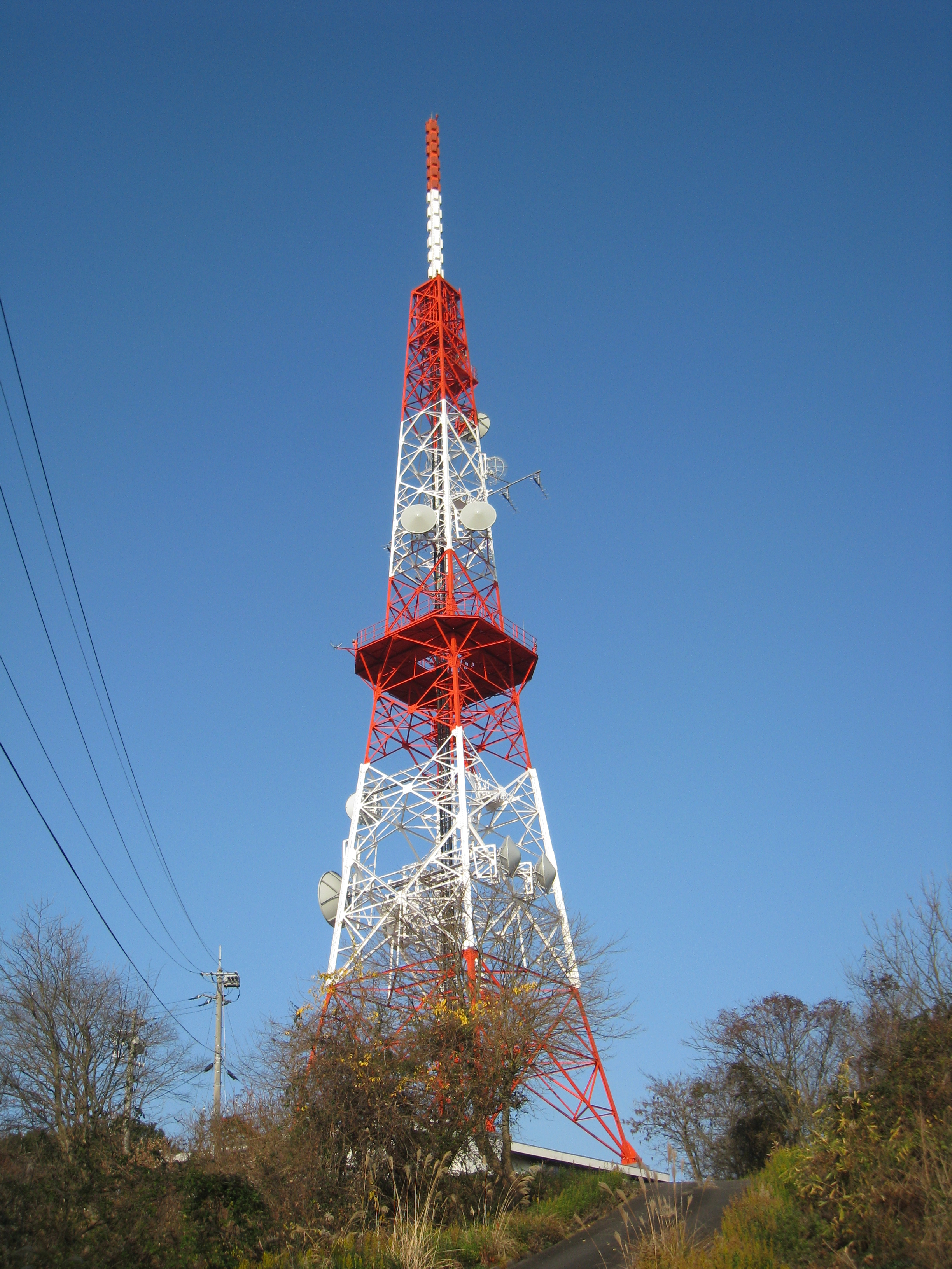 North radio tower on Mt. Maedayama in Takamatsu, Kagawa Japan